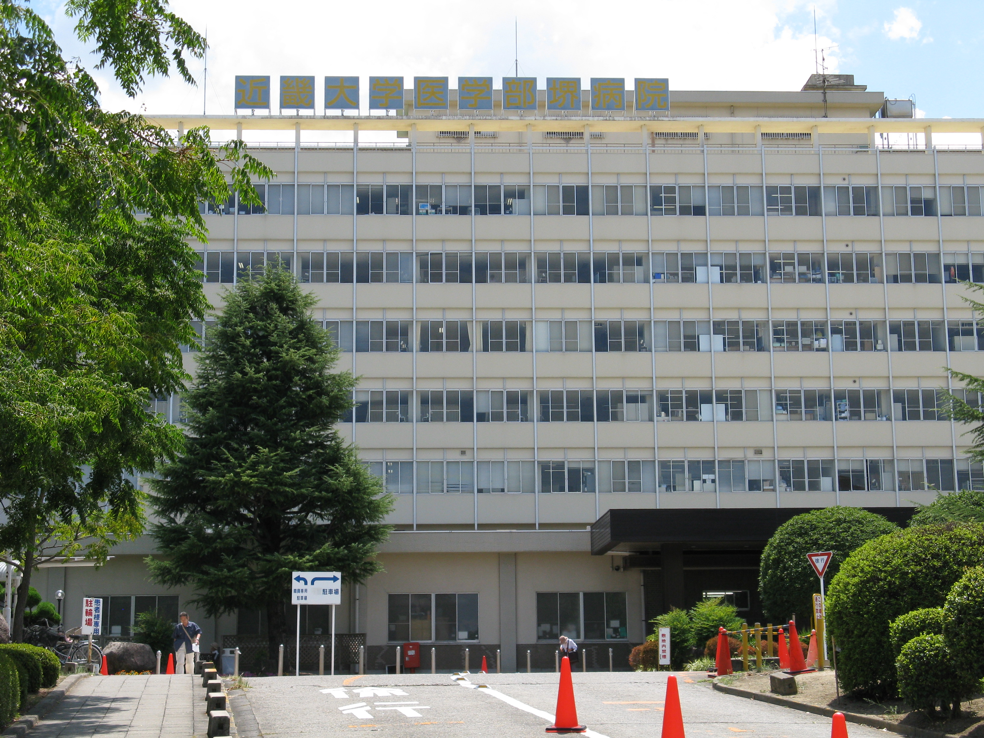 近畿大学医学部堺病院